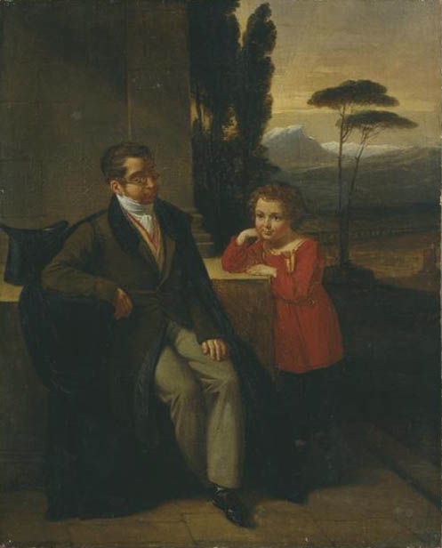 Карл Васильевич Несселроде с сыном Дмитрием.